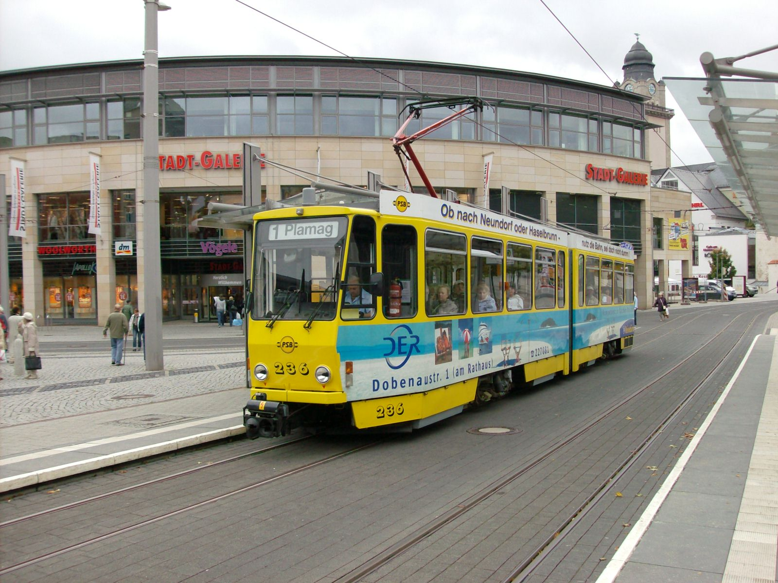 Tw 236 an der Zentralhaltestelle Tunnel, Plauen